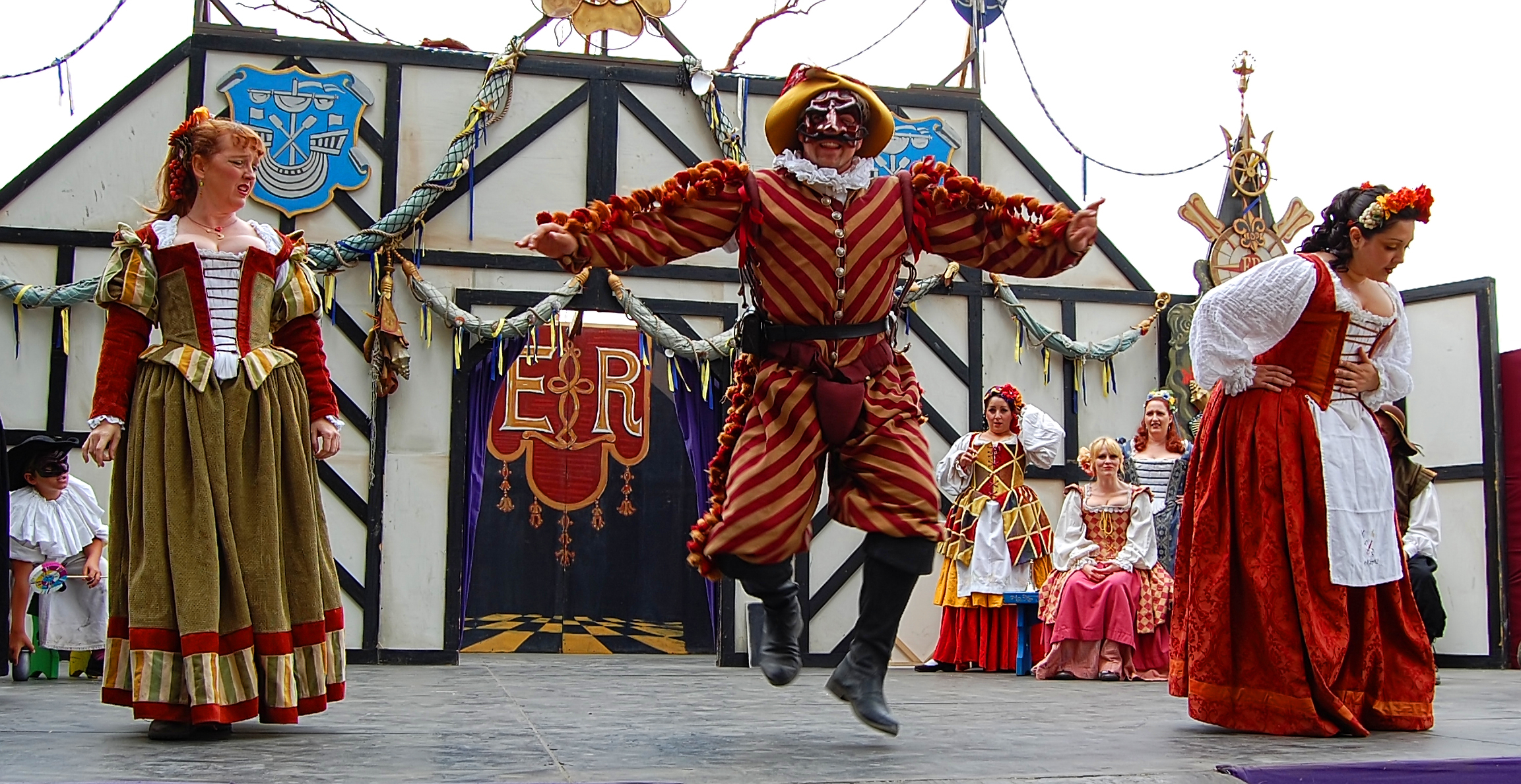 Commedia Volante